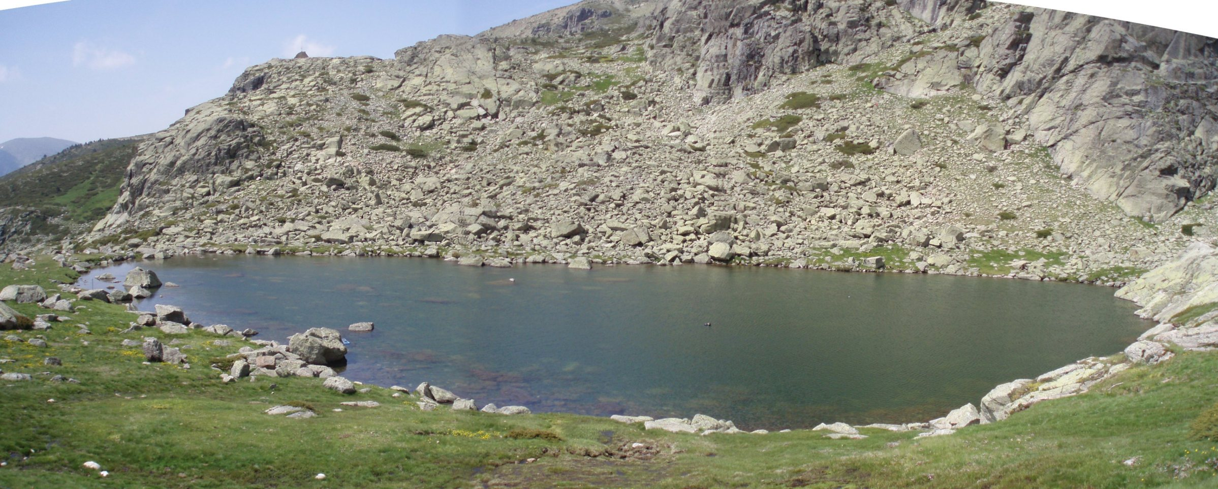 Laguna grande de Peñalara, ubicada en la Comunidad de Madrid (España).